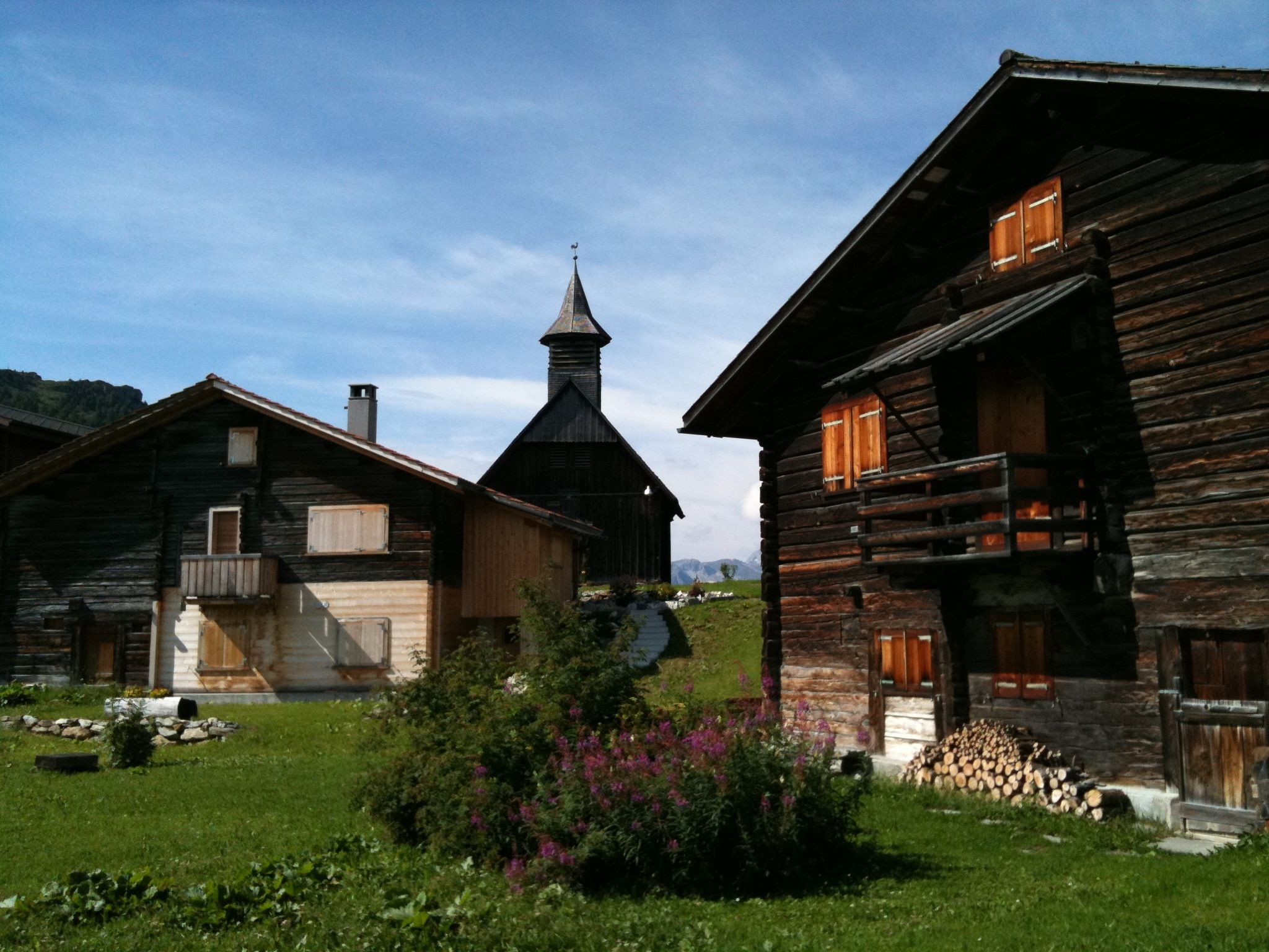 Obermutten (Kanton Graubünden)